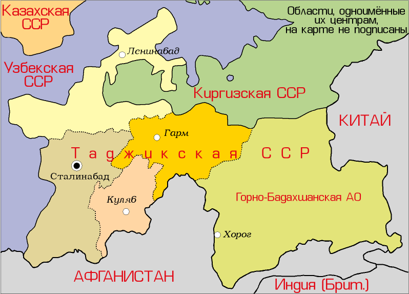 Карта Таджикской ССР в 1940 году